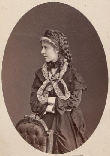 Графиня Маргарита Сергеевна Стенбок-Фермор, урожд. княжна Долгорукова (1839—1912)